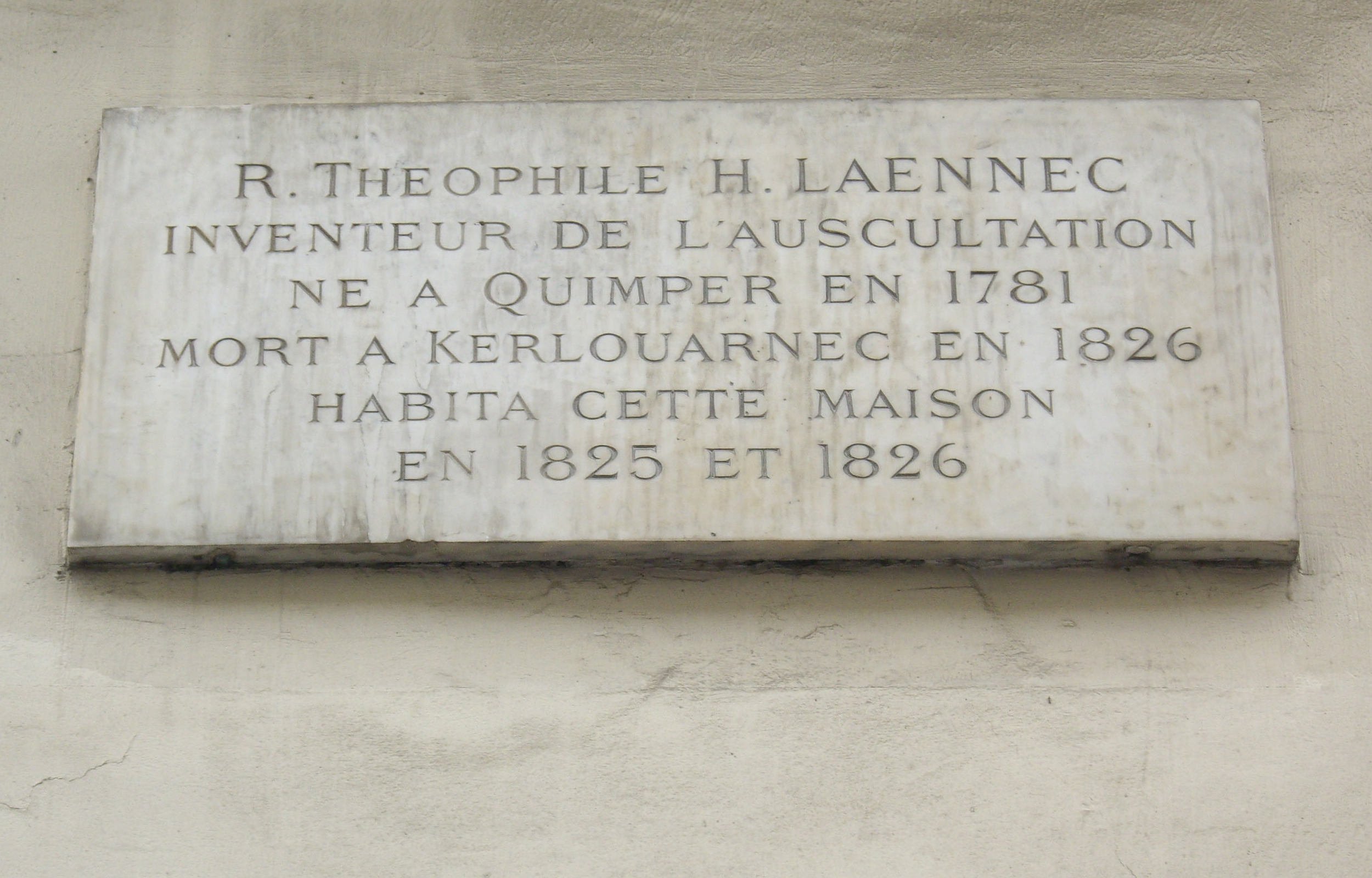 Plaque apposée au n° 17 de la rue de l'Abbé-Grégoire, Paris 6e, où habita le médecin René-Théophile-Hyacinthe Laennec (1781-1826) en 1825 et 1826.